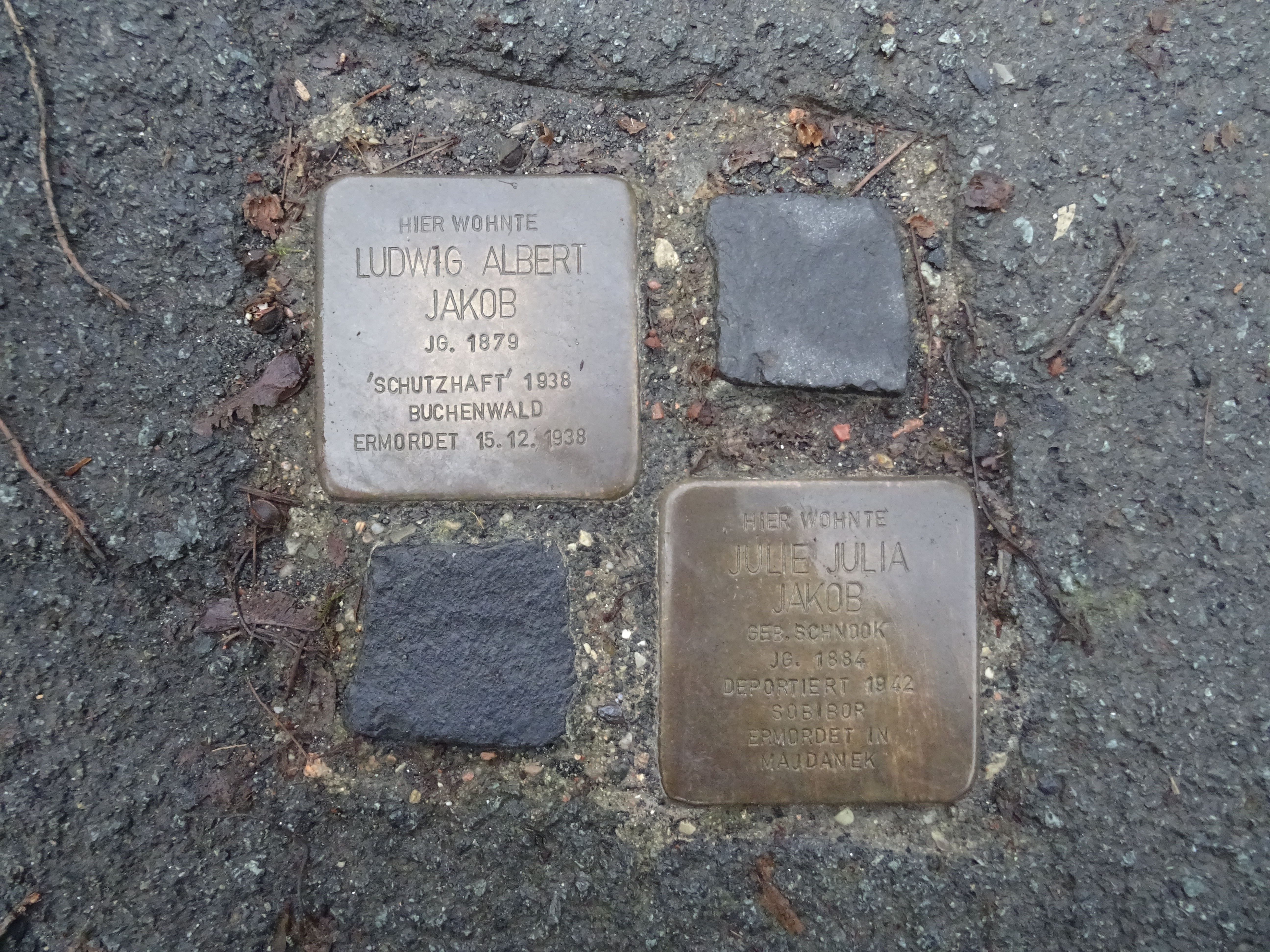 Stolpersteine Biskirchen Schulstraße 6